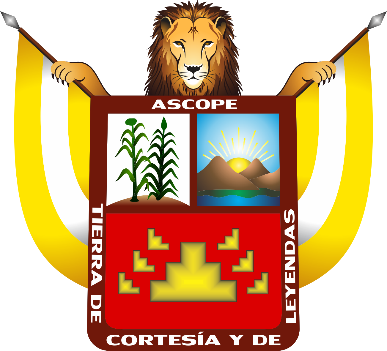 escudo ascope